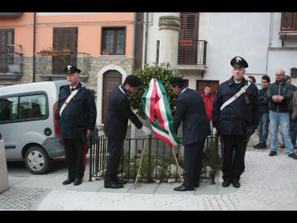 Deposizione corona dei caduti in occasione della festa di San Rocco di maggio a Satriano di Lucania